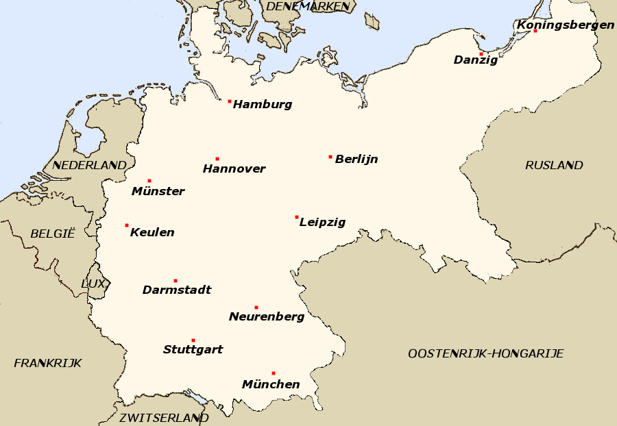 Kaart van het Duitse Rijk - zelf gemaakt op basis van een 19e-eeuwse (PD) kaart - de oude kaart was erg onduidelijk dus ik heb alle binnengrenzen, steden enz. weggehaald en (deels) opnieuw erin gezet, kleuren aangepast en geëgaliseerd + de buitengrenzen duidelijker gemaakt - ik hoop binnenkort ook de grenzen van de landen bínnen het rijk toe te voegen. Alhier ook zonder naamaanduidingen: Afbeelding:DuitseRijkKaal.png